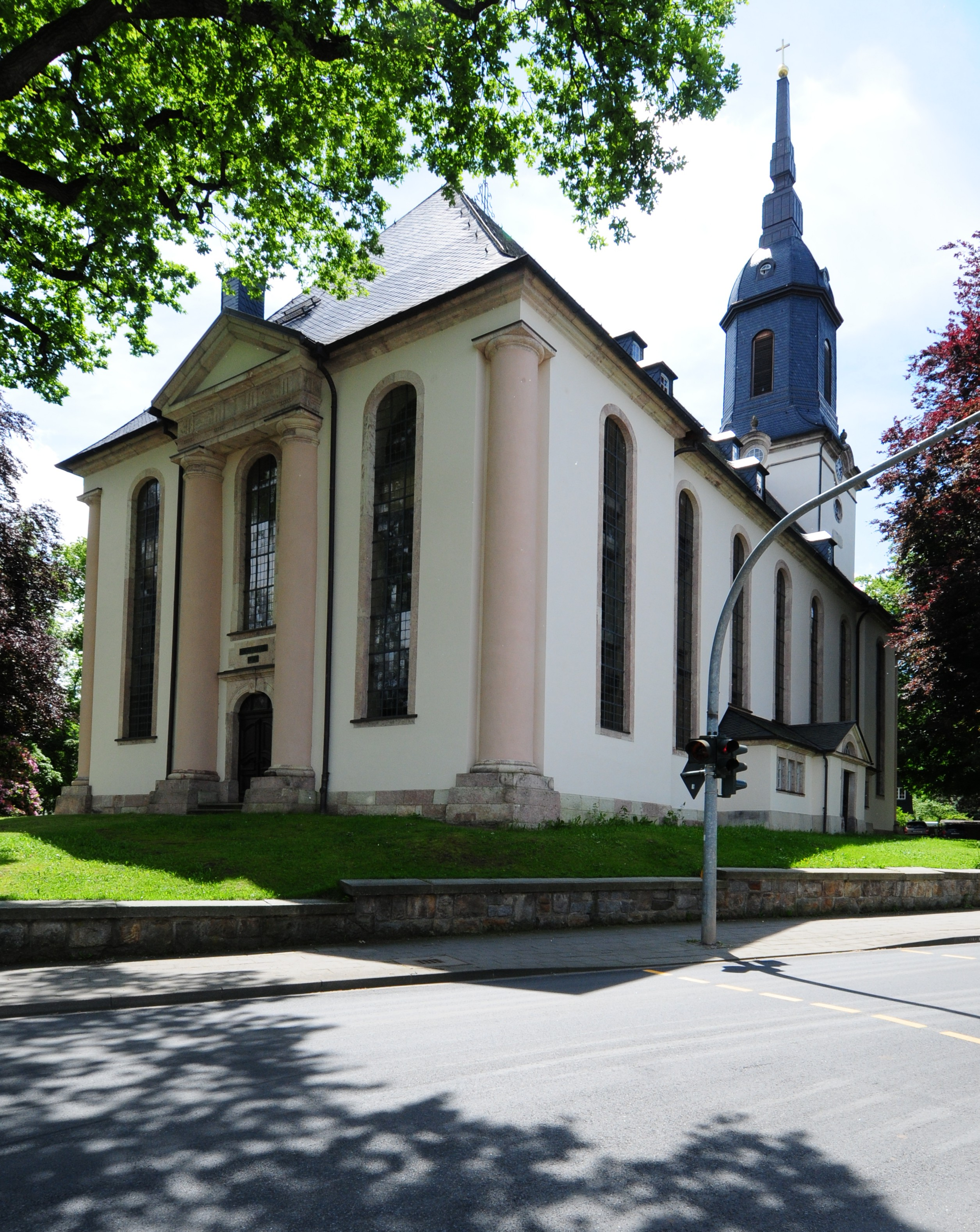 Chemnitz-Reichenbrand, Evangelische Johanniskirche in Reichenbrand, errichtet 1804-1810 von Johann Traugott Lohse (Sachsen, Deutschland)